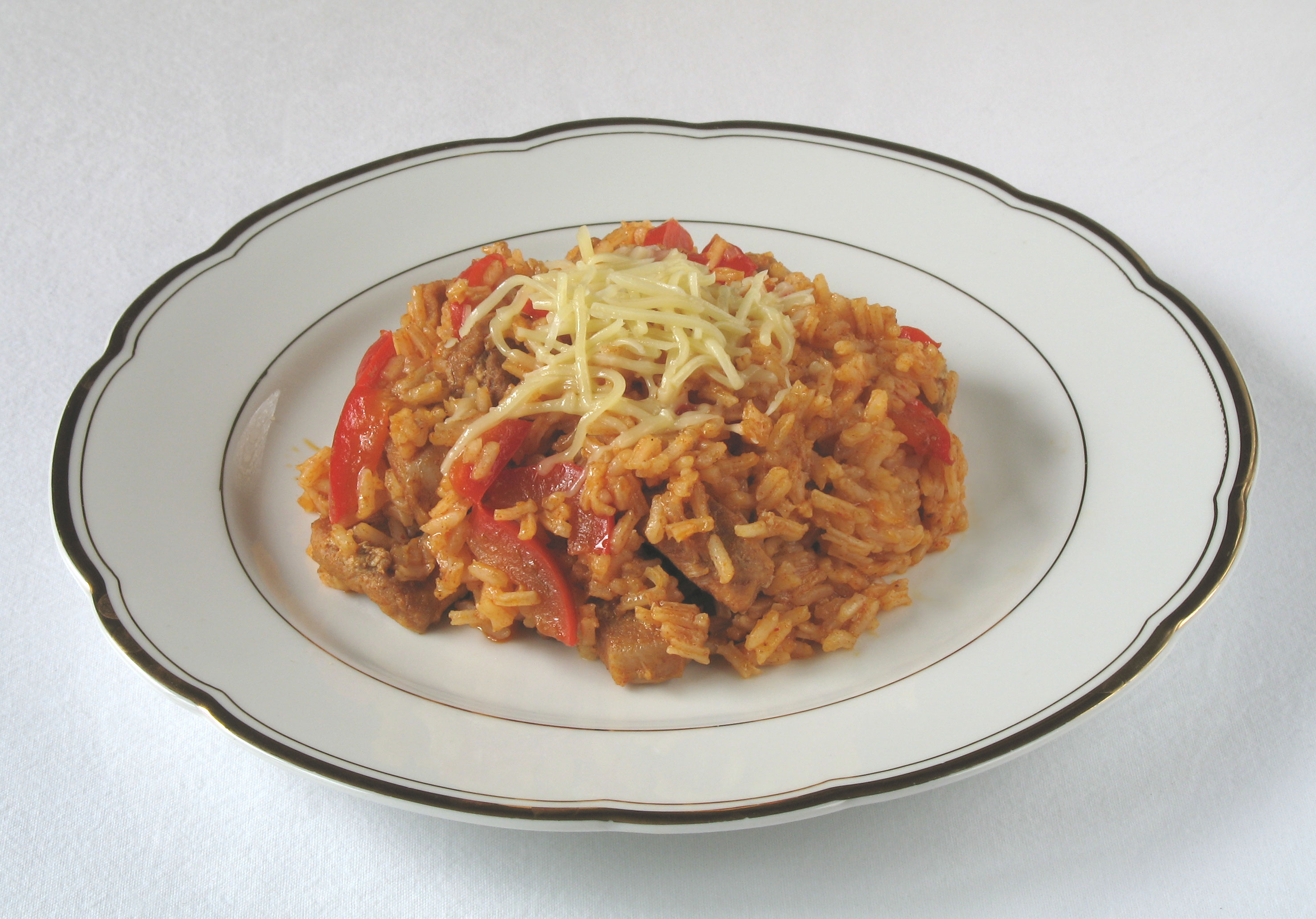 Reisfleisch (Spezialität der österreichischen Küche)